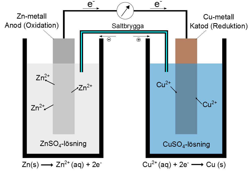 Daniell-element